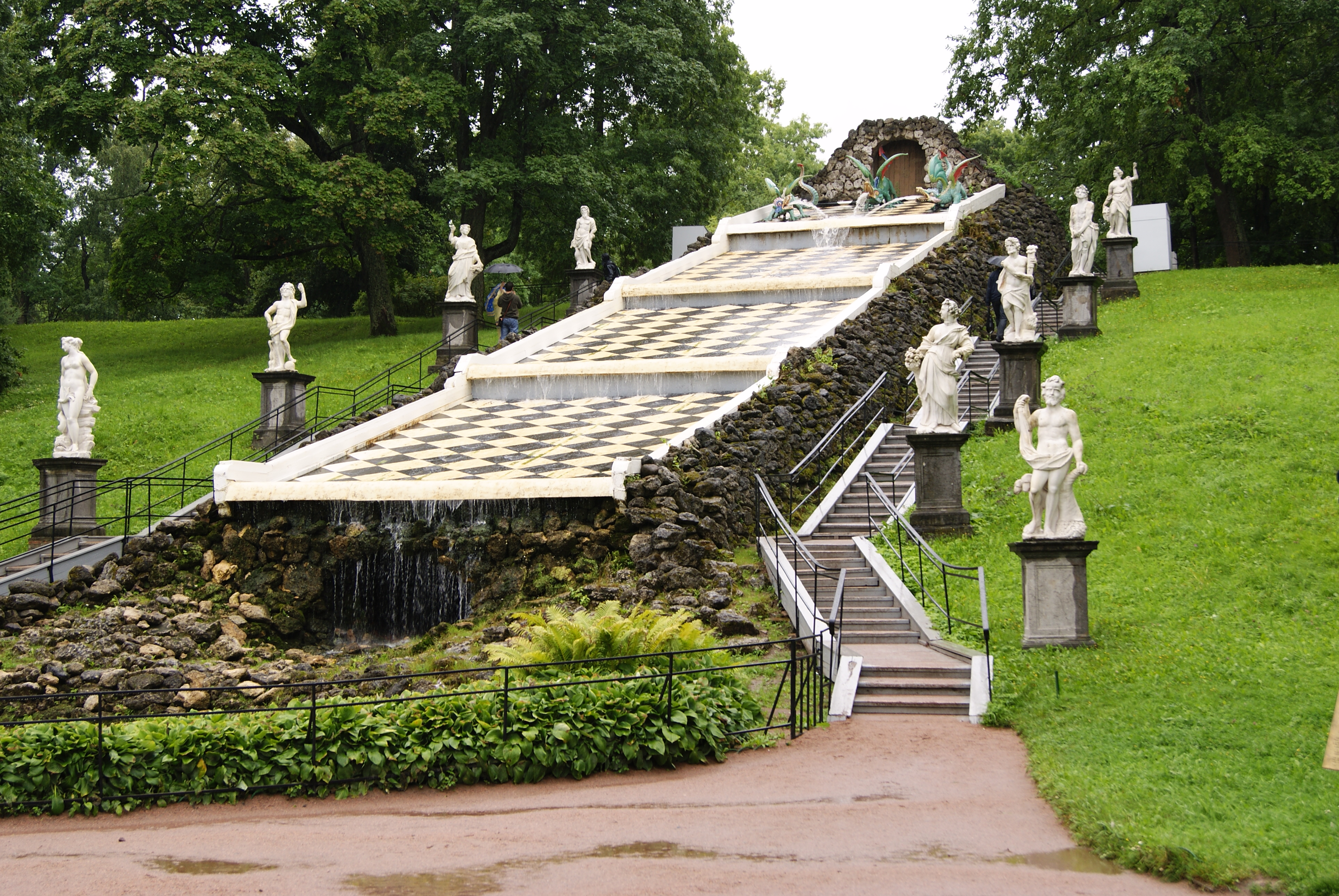 Каскад Драконов («Шахматная гора») со скульптурой